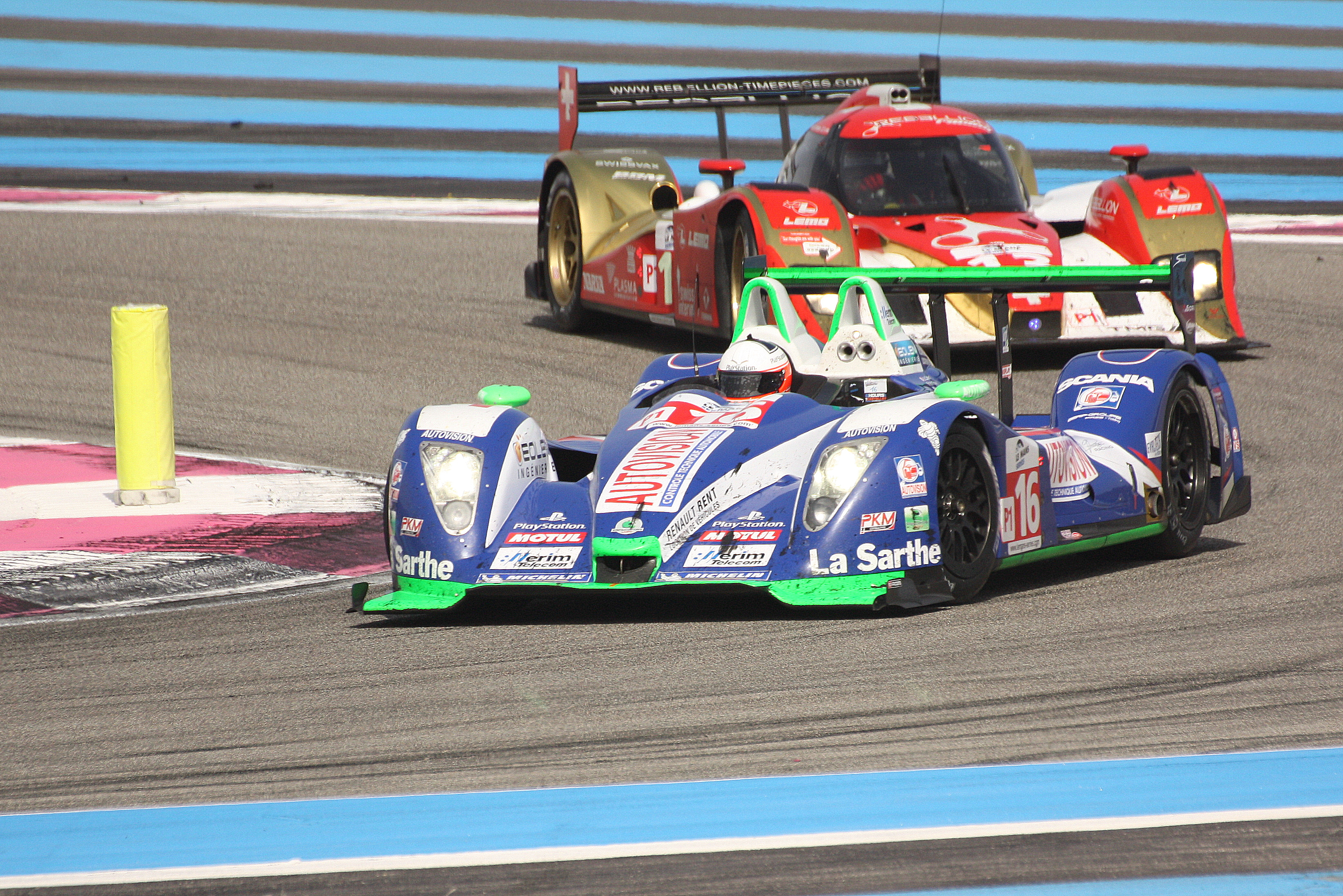 Pescarolo Victorieuse lors des 6h du Castellet 2011